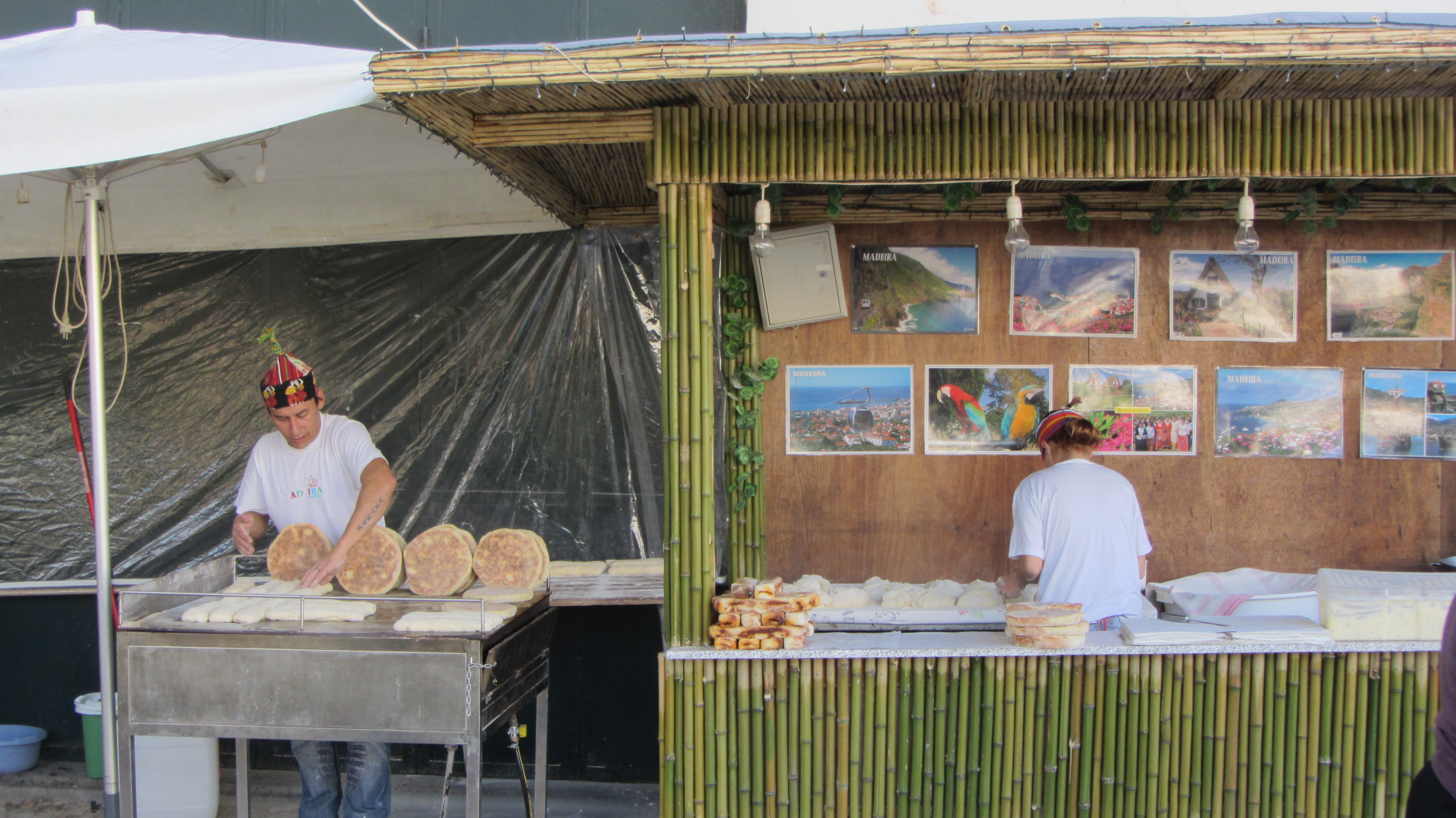 Street vendors of pastries